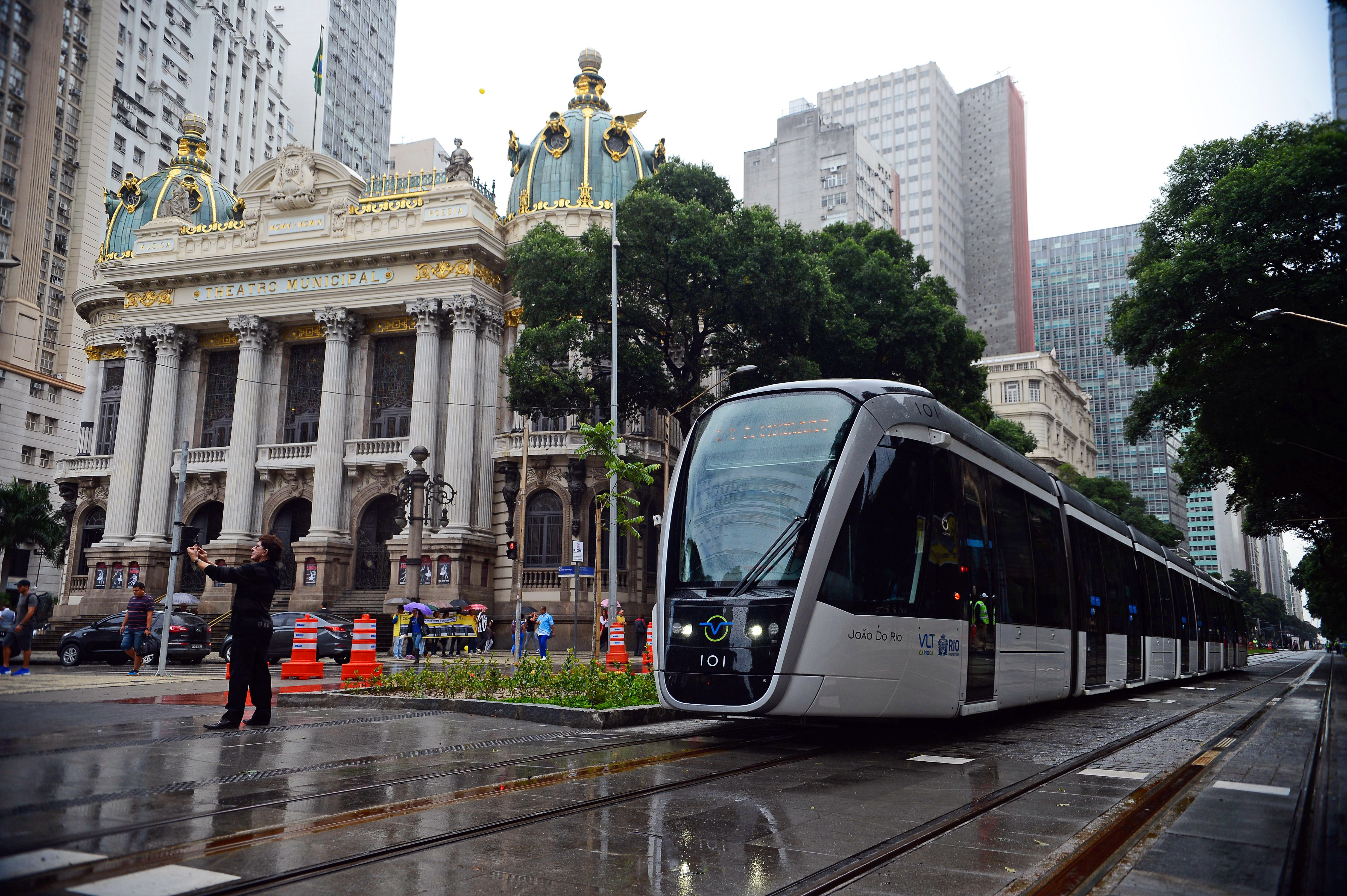 Rio de Janeiro - Viagem inaugural do Veículo Leve sobre Trilhos (VLT) Carioca, no centro da cidade.